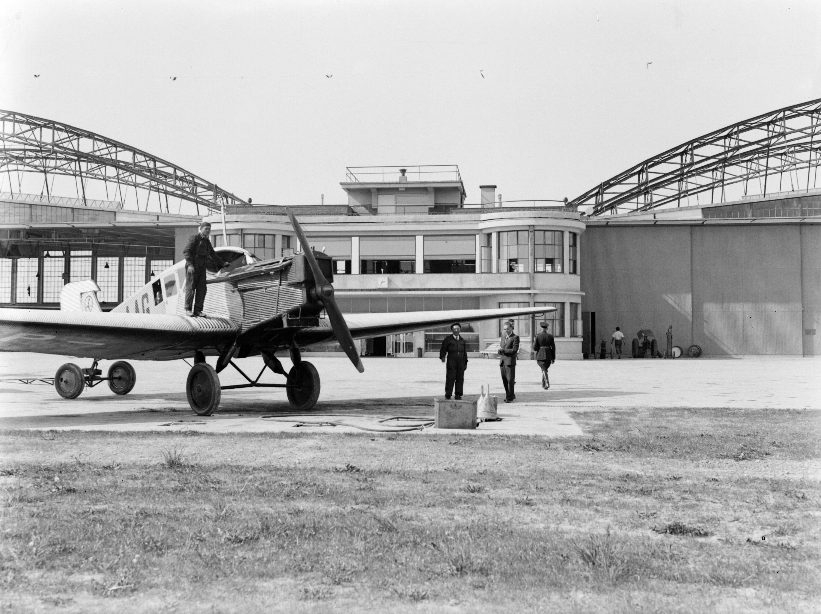 Collectie / Archief : Fotocollectie Van de Poll Reportage / Serie : Reis naar Polen Beschrijving : Vliegtuig op de luchthaven van Warschau in Polen Datum : 1934 Locatie : Polen, Warschau Trefwoorden : vliegtuigen, vliegvelden Fotograaf : Poll, Willem van de, [onbekend] Auteursrechthebbende : Nationaal Archief Materiaalsoort : Glasnegatief Nummer archiefinventaris : bekijk toegang 2.24.14.02 Bestanddeelnummer : 190-0020